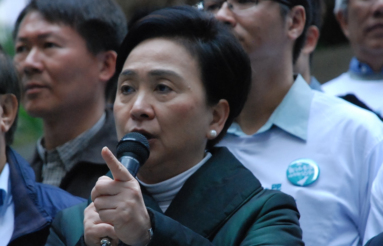 中文（香港）: 民主黨主席劉慧卿表示，如果北京背棄普選承諾，該黨超過40名成員將參與佔中公民抗命運動